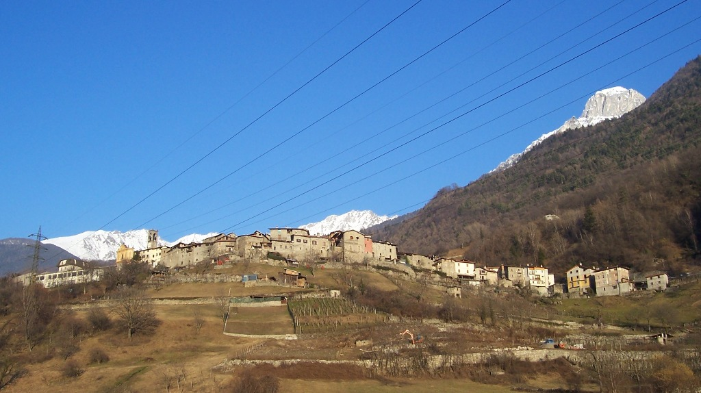 Ceto, Val Camonica, Italia